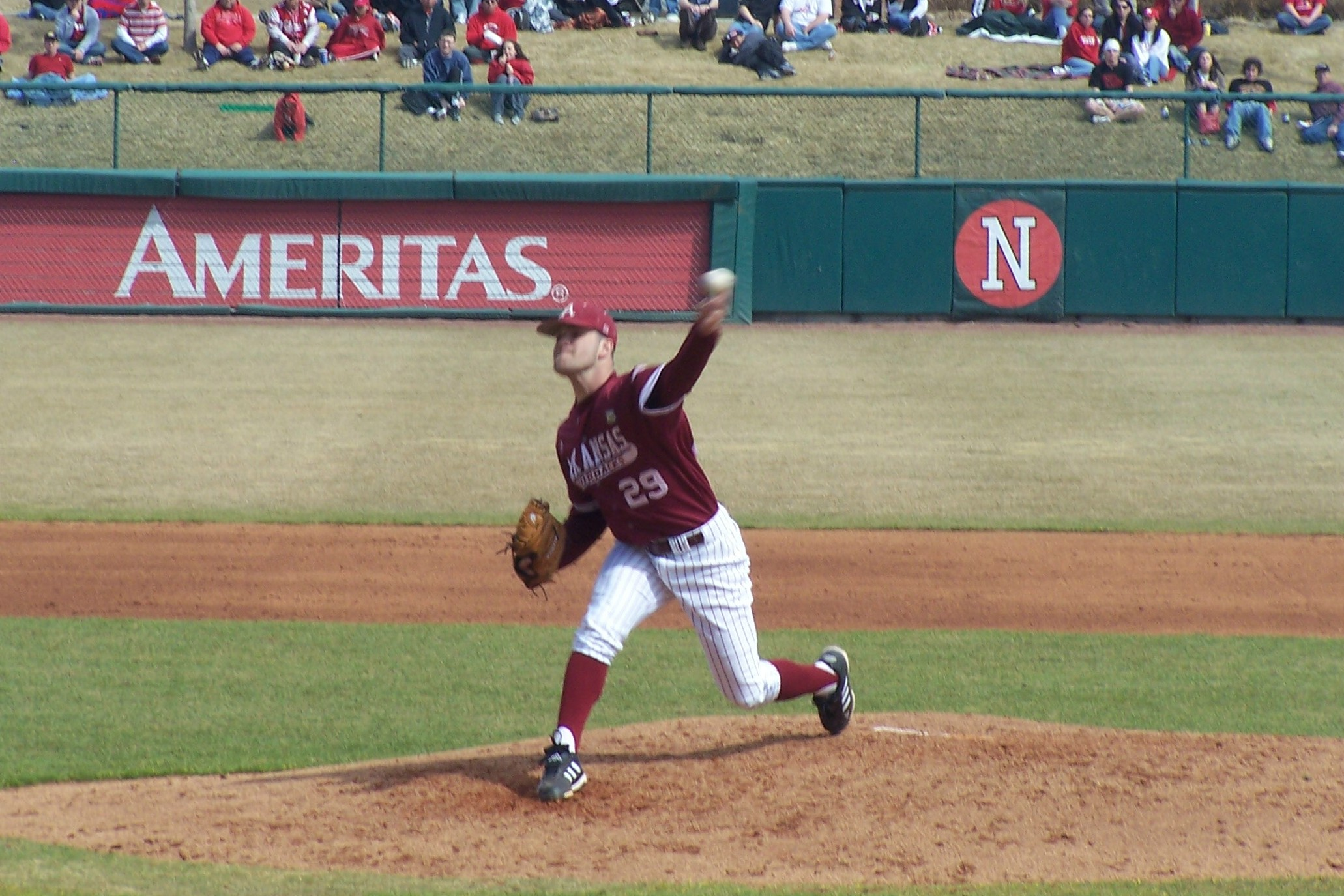 Razorback pitcher Dallas Keuchel pitching in 2008.